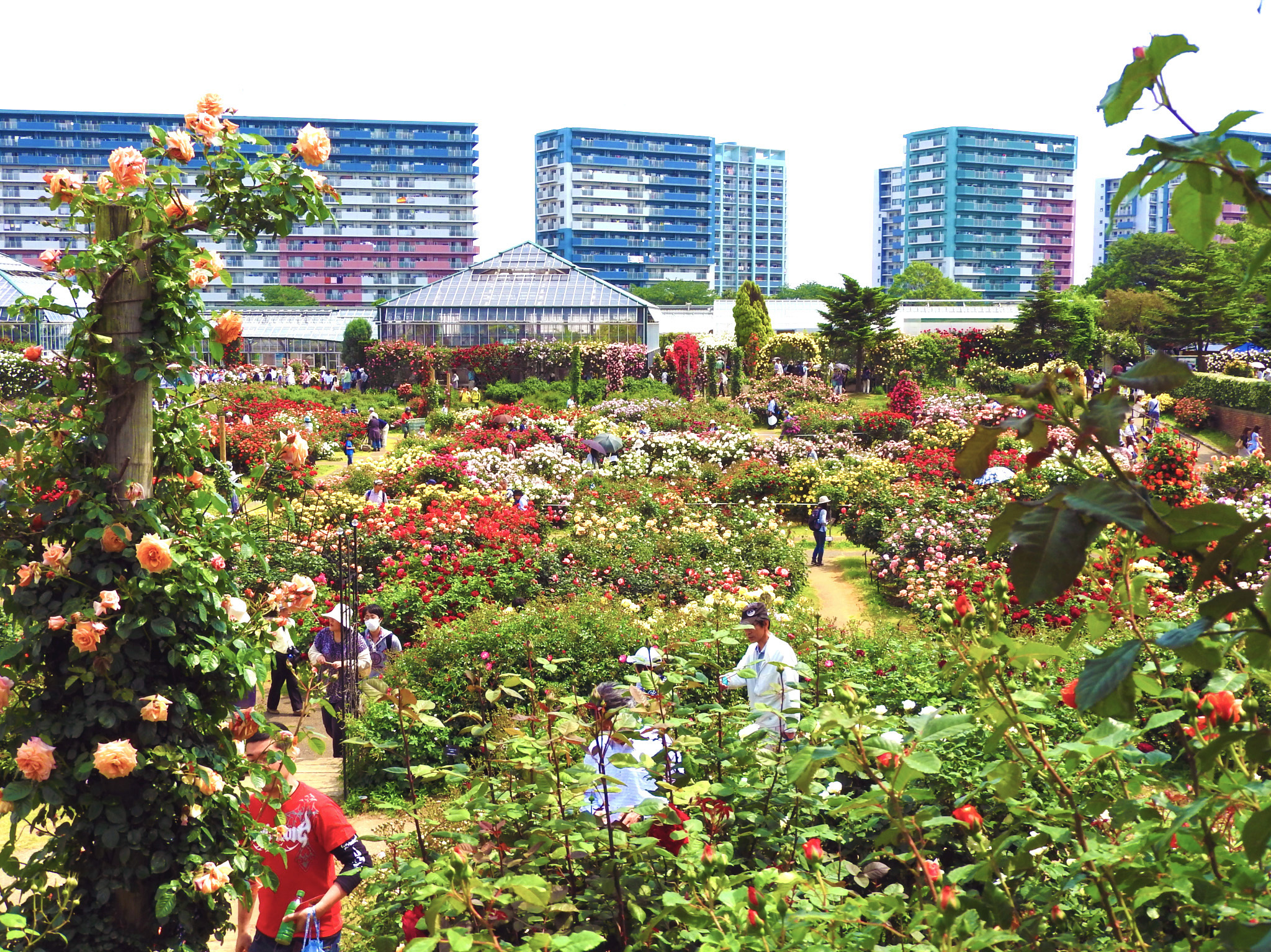 NakaoSodanshitsu氏による京成バラ園 01